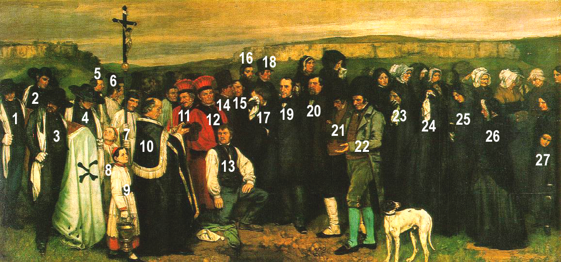 Courbet, Un enterrement à Ornans (numérotation des personnages)